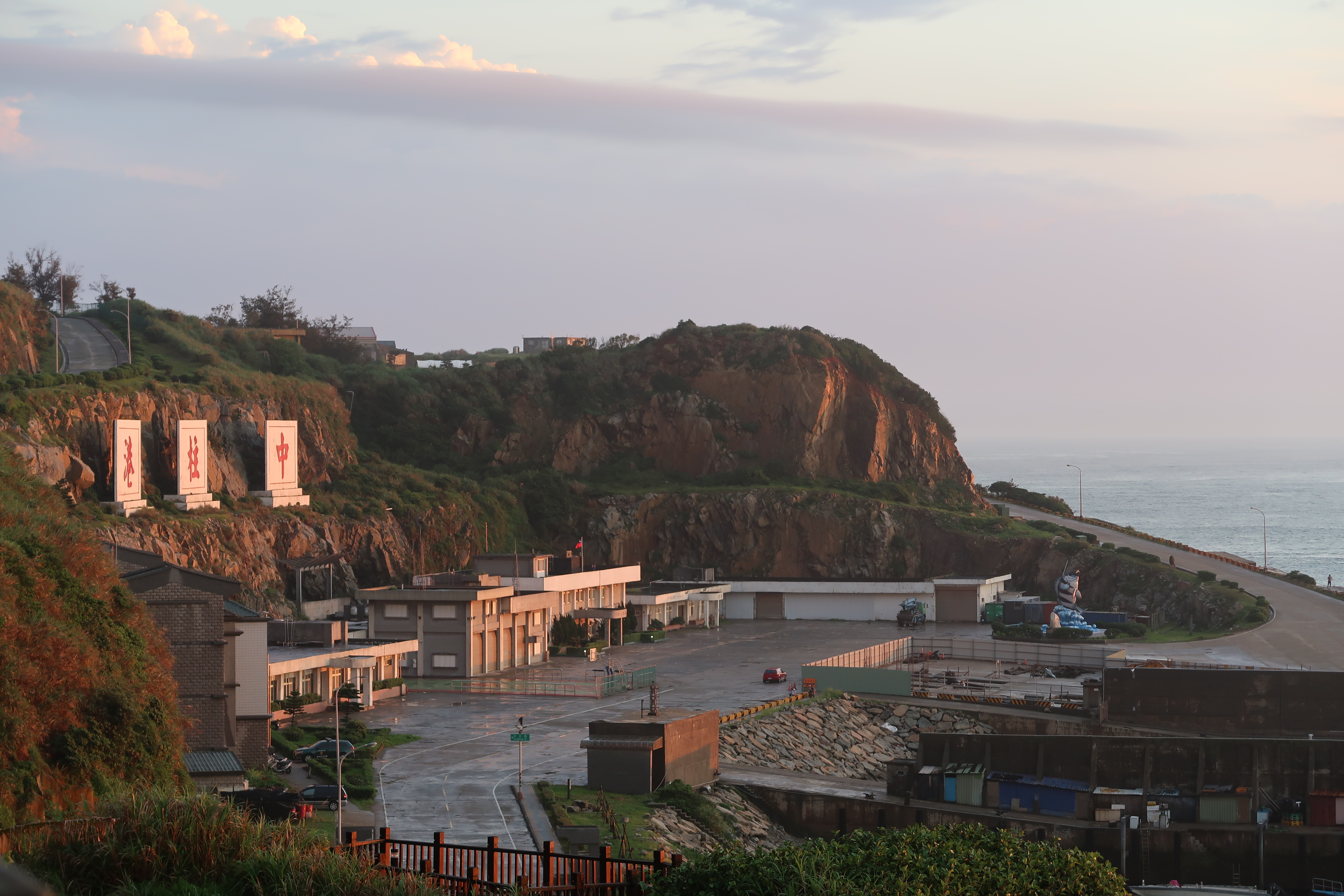 中文（台灣）: 位於東引島的中柱港